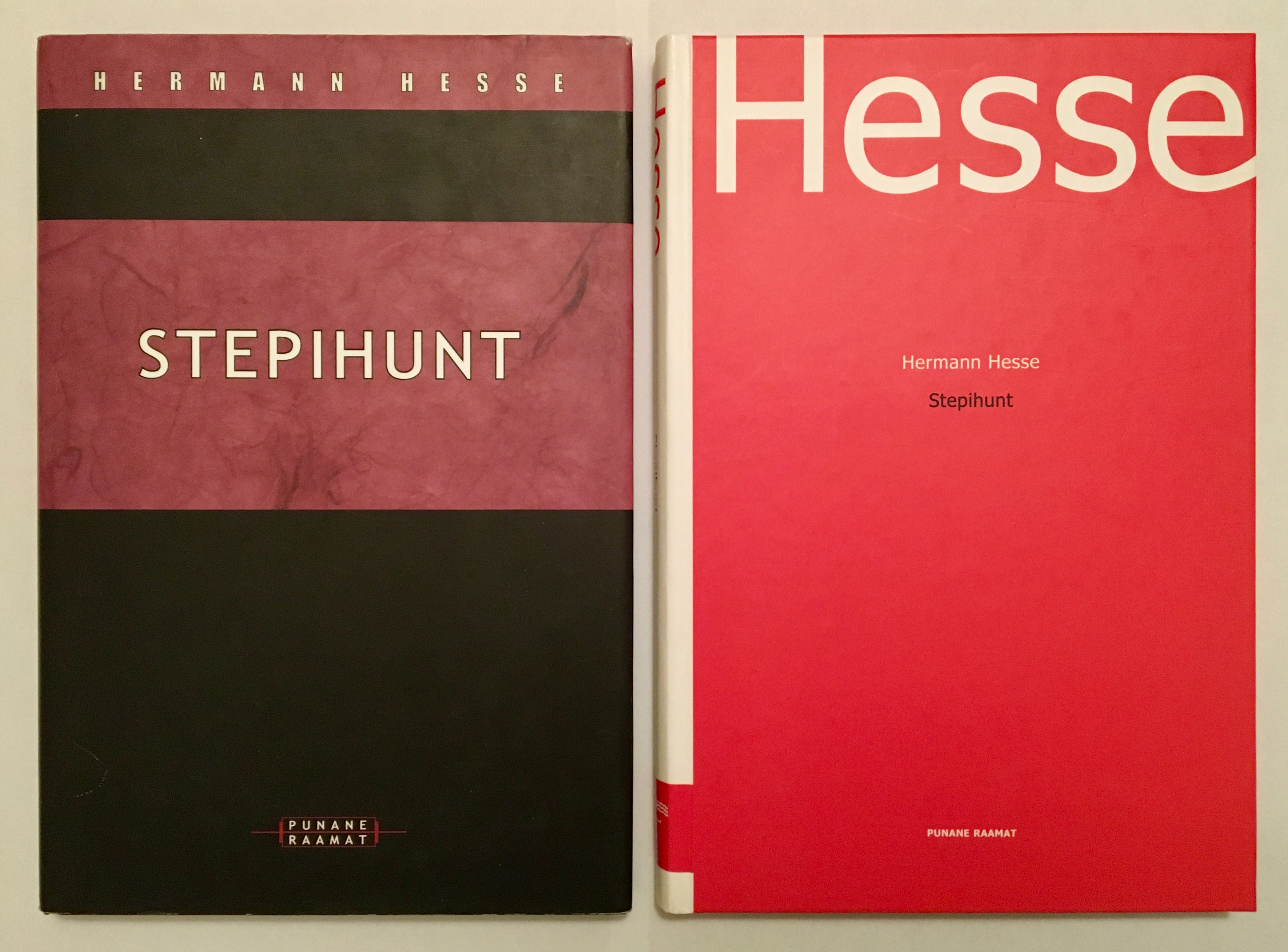 Esimene ja teine kujundus